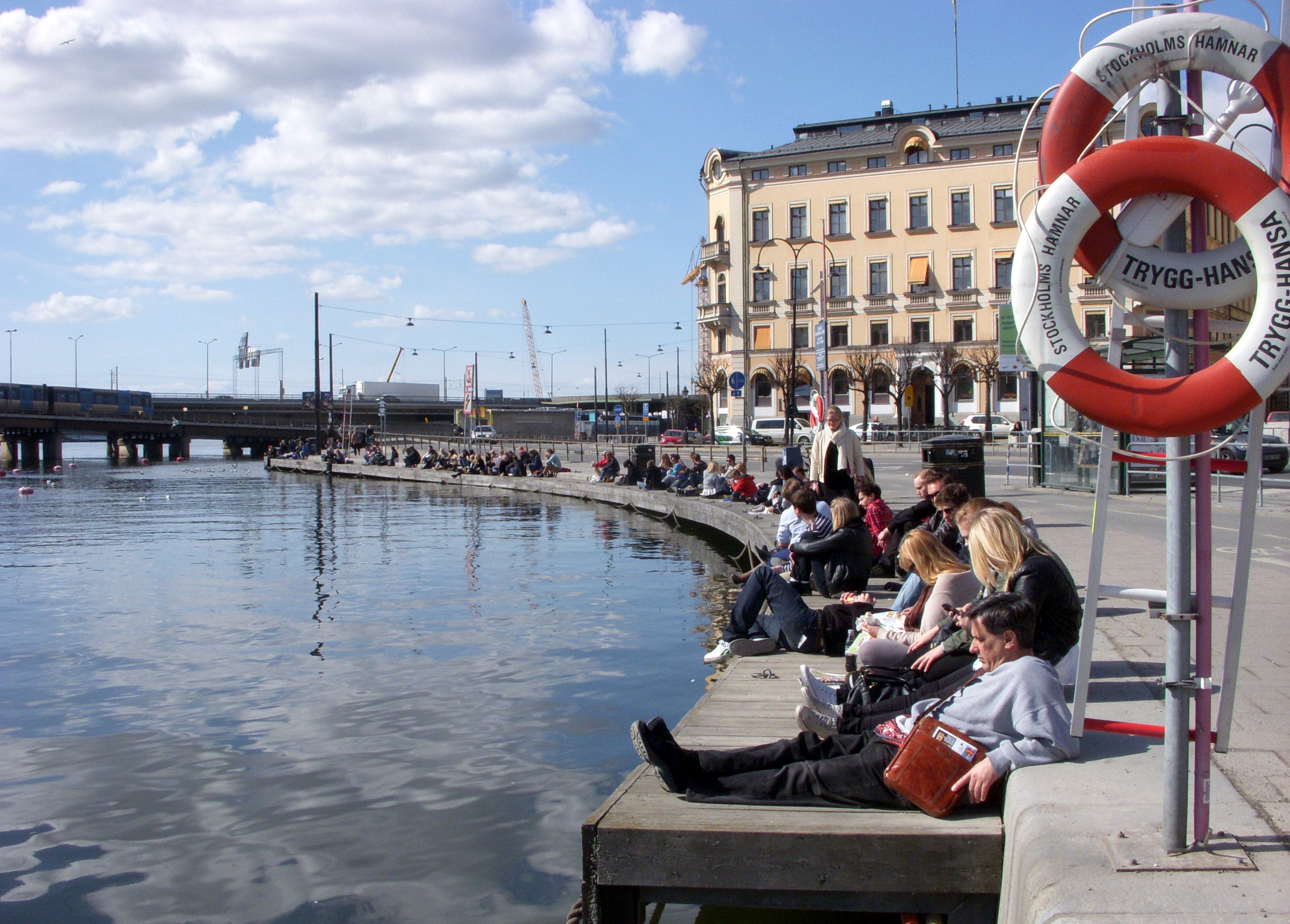 Kornhamn, kajen vid Kornhamnstorg i Stockholm på våren 2011